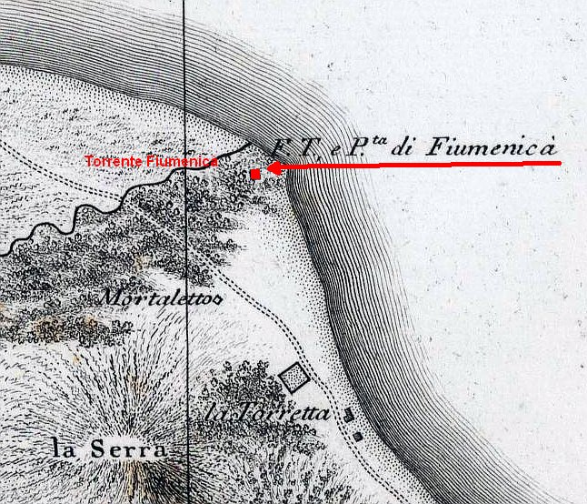 Estratto dall'Atlante del Regno di Napoli di Rizzi-Zannoni Ed. 1808, con evidenziata la posizione della Torre di Fiumenicà